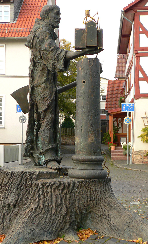 Bonifatius Denkmal beim Dom in Fritzlar